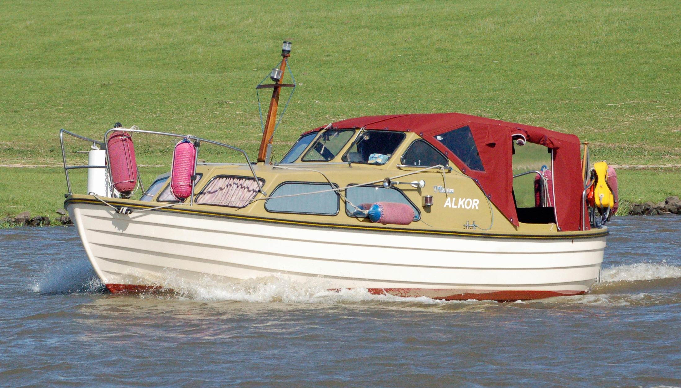 Die Alkor (CUX-F 18) aus Cuxhaven auf der Pinnau